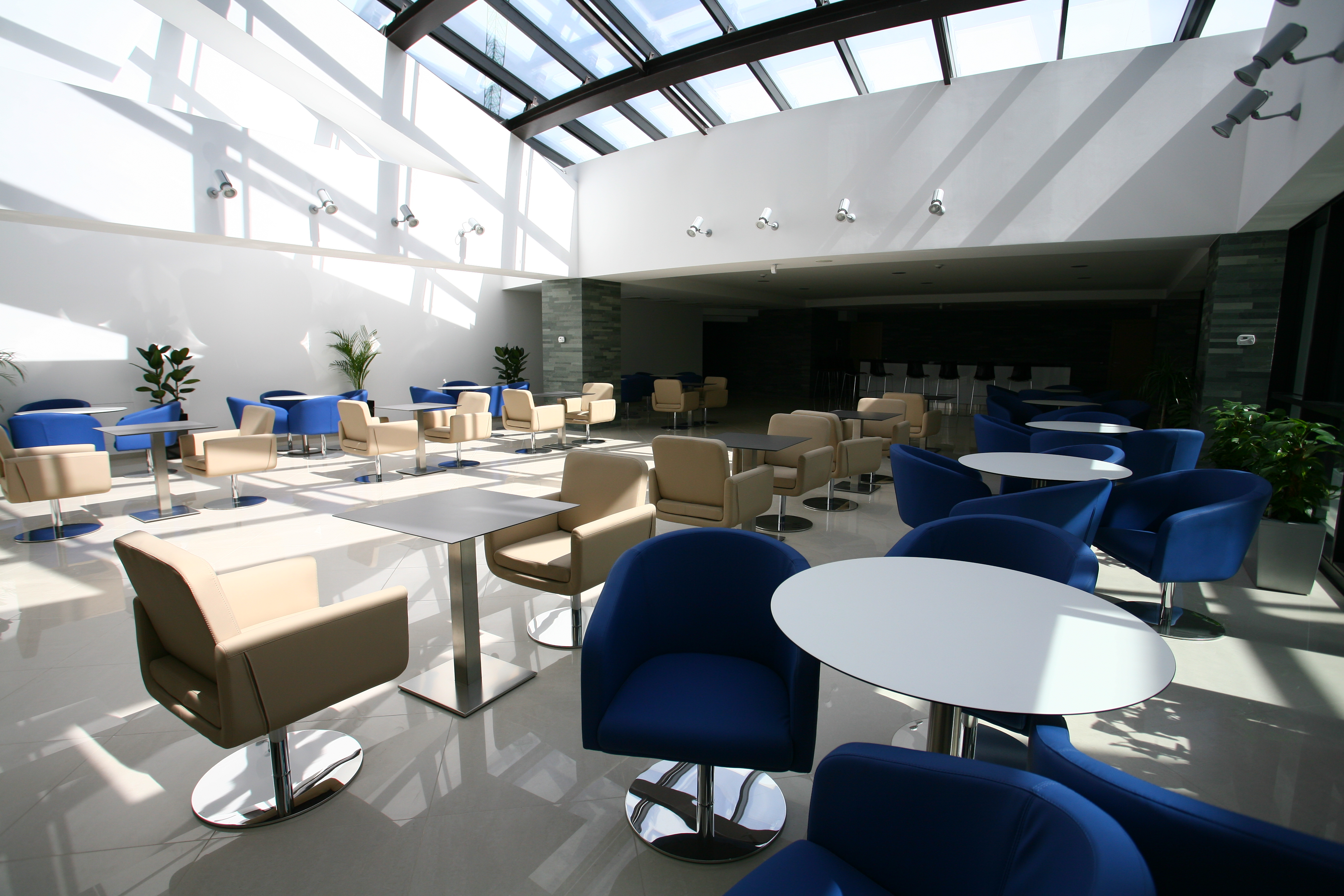 Խոհանոց